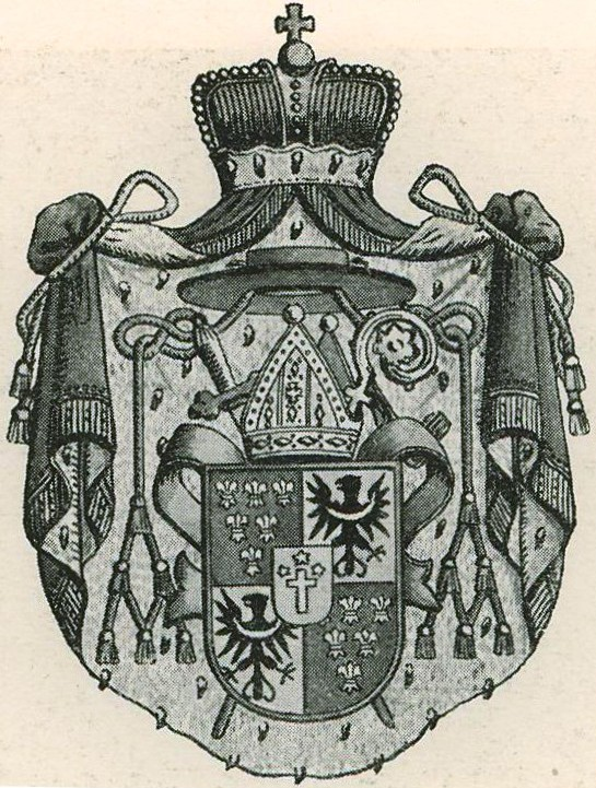 Wappen des Breslauer Fürstbischofs Robert Herzog